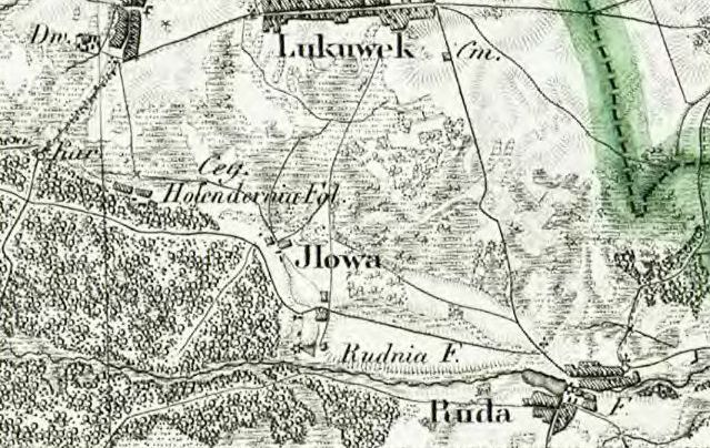 Iłowa i Rudnia (powiat chełmski) na mapie topograficznej Krolestwa Polskiego z 1839 roku